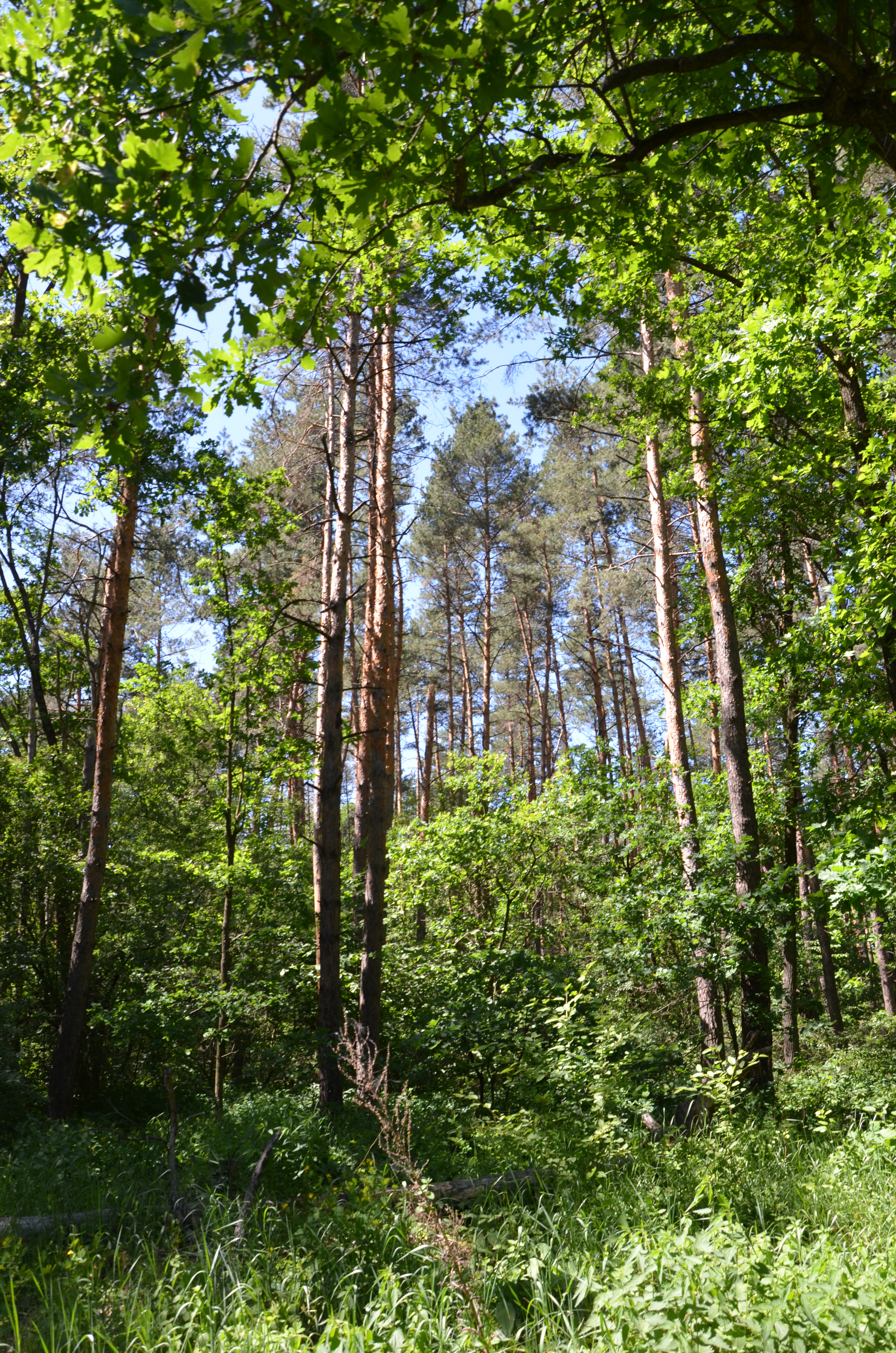 Чернечий ліс, Києво-Святошинський район